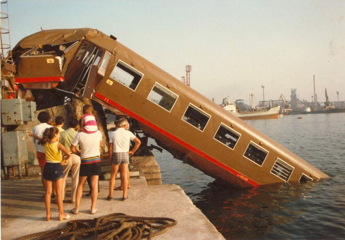 Incidente ferroviario al porto di Piombino del 31 luglio 1983: il convoglio "Freccia dell'Elba" in marcia verso la stazione di Piombino Marittima, nell'approssimarsi a quest'ultima non riesce ad attuare correttamente le operazioni di frenatura, impatta, col terminale posto sul molo al termine dei binari, lo abbatte e conclude la propria corsa in mare. L'elettromotrice di testa ALe 840 ne risultò completamente immersa, seguita dalla rimorchiata Le 800.005 che si immerse anch'essa parzialmente in acqua, rimanendo in bilico sul bordo del molo; il resto del convoglio, composto da un'altra rimorchiata e dall'elettromotrice di coda, rimasero sul molo risultando gravemente danneggiate dall'impatto[3]. Solo per fortunata casualità l'incidente non provocò vittime o feriti: il treno era privo di passeggeri ed il percorso ferroviario, in parte a raso, è sgombro da persone o mezzi. Il personale di macchina riuscì a salvarsi senza danni gettandosi dal treno in corsa.